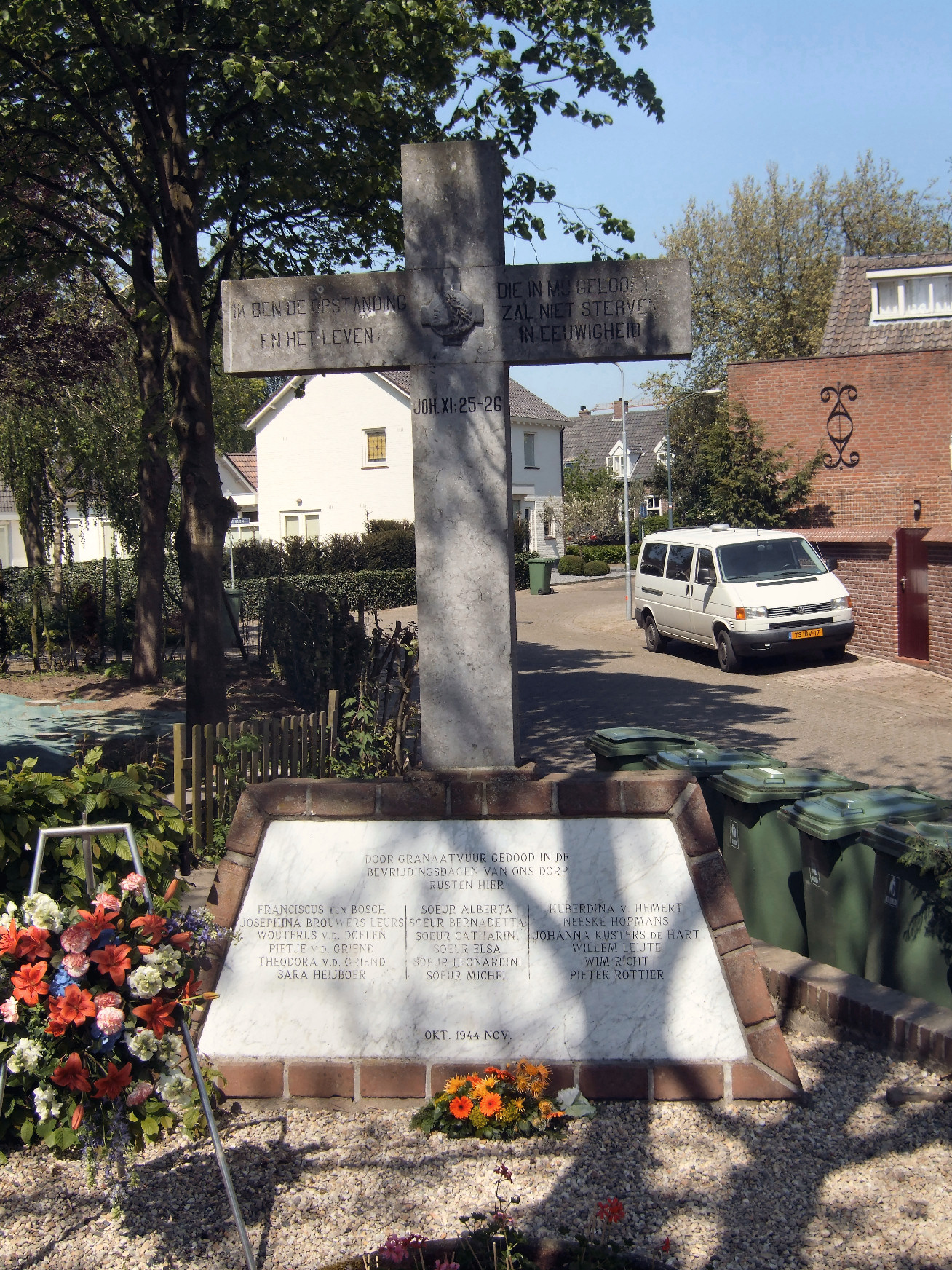 Oorlogsmonument in Engelen